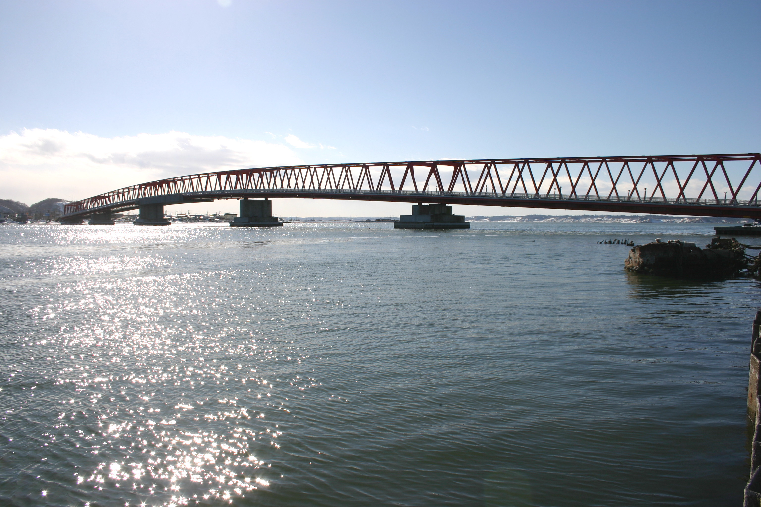 厚岸大橋 厚岸町